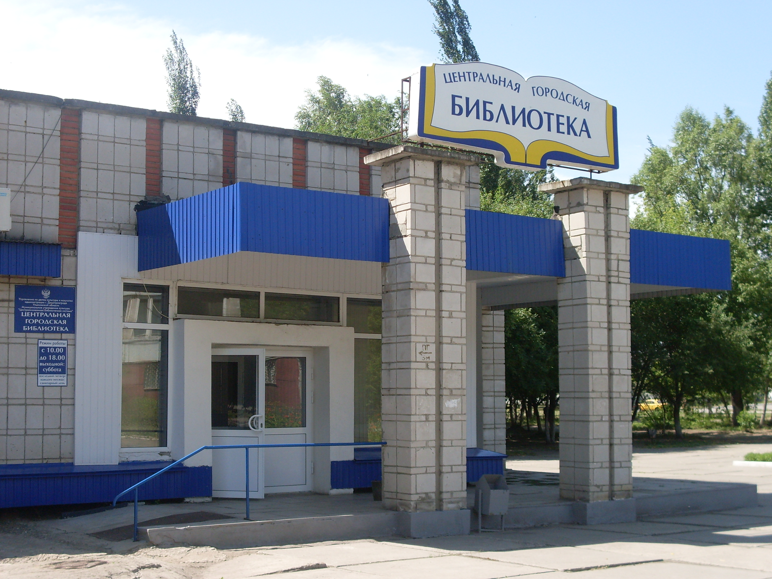 Центральная городская библиотека города Димитровграда